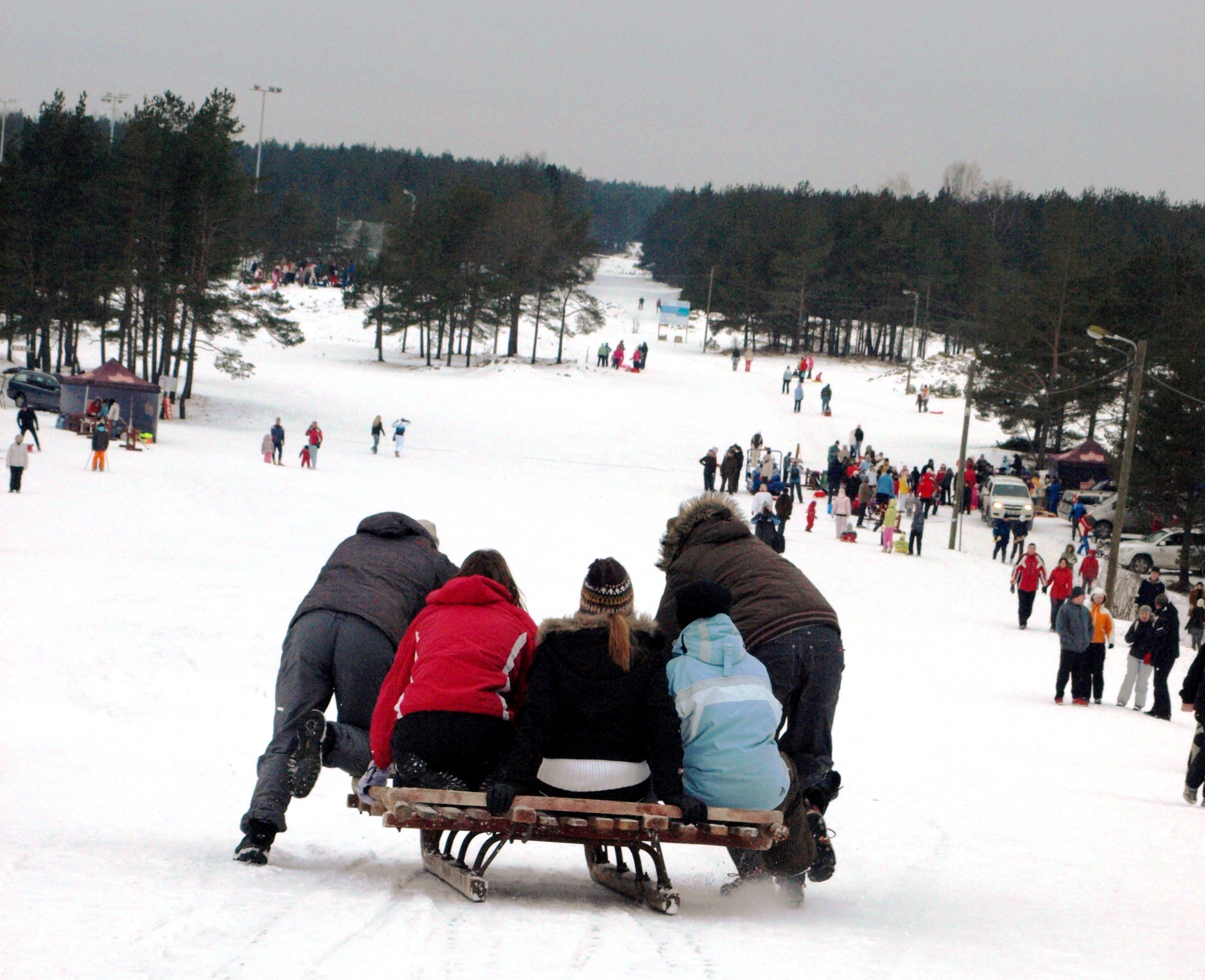 Talv Keilas